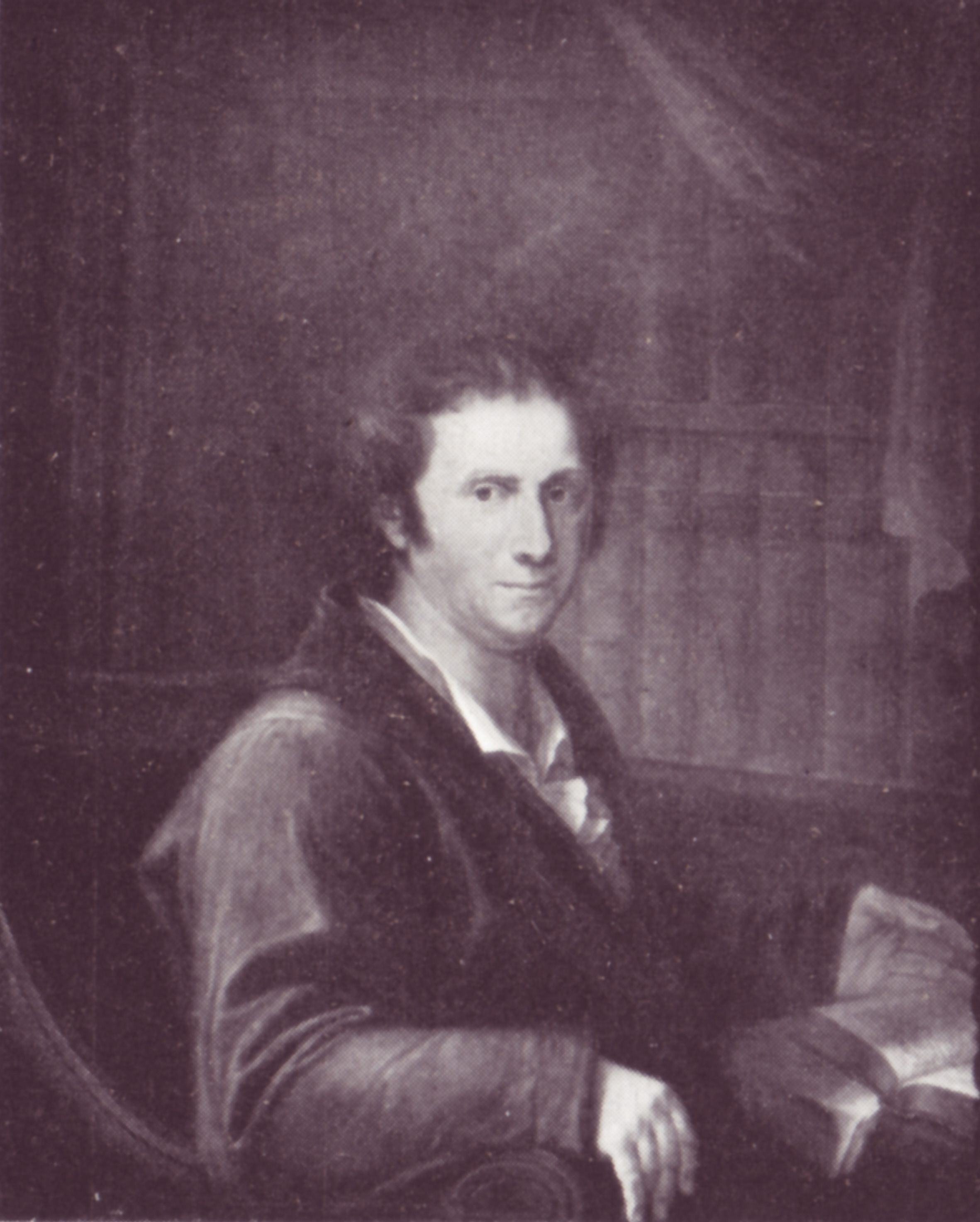 Nicolaus Heinrich Brehmer (* 3. Juni 1765 in Lübeck; † 22. August 1822 ebenda), Arzt und zweimaliger Direktor der Gesellschaft zur Beförderung gemeinnütziger Tätigkeit